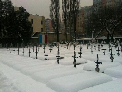 Carré français Bellu (Bucarest)